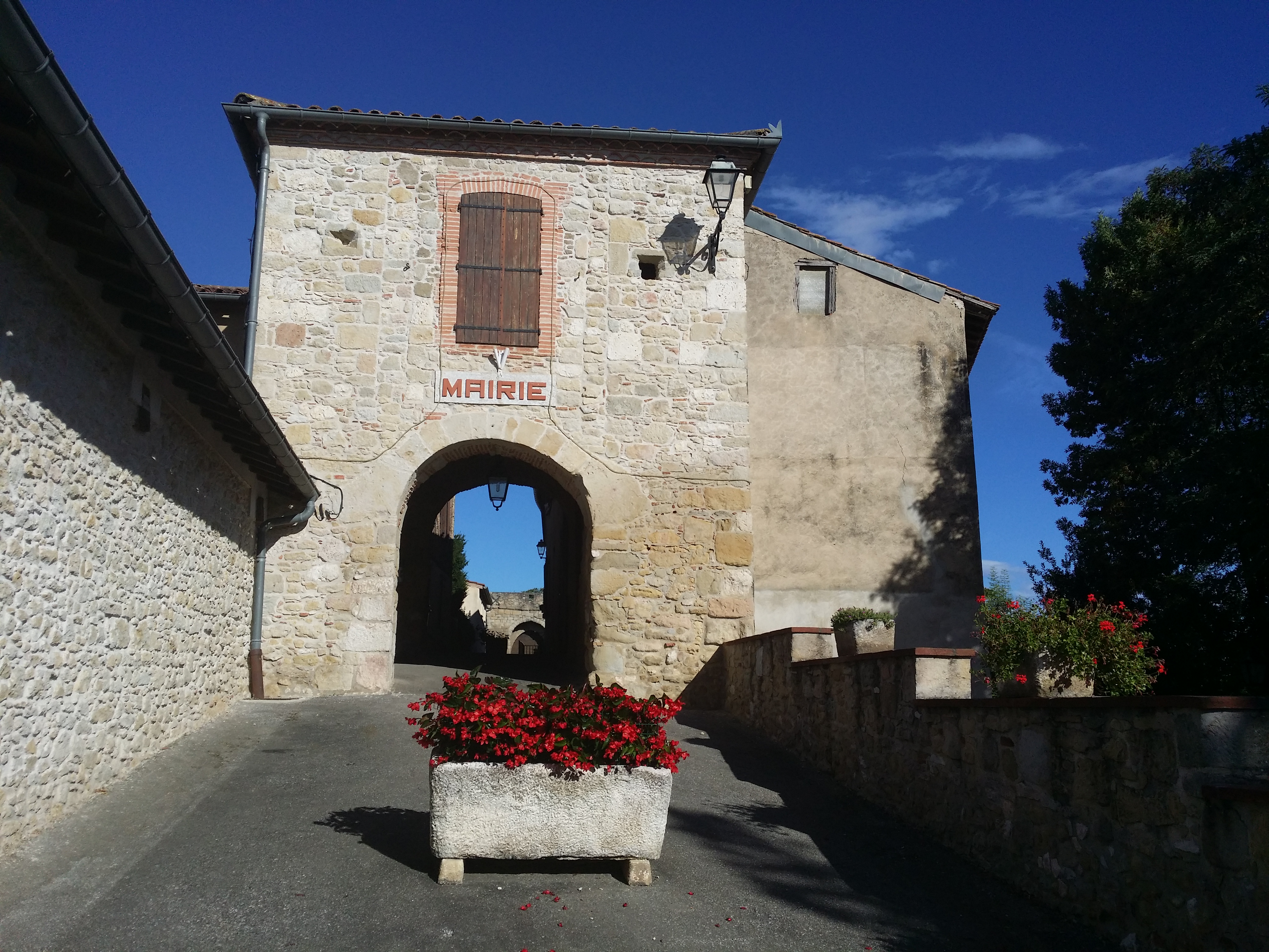 Le porche de l'entrée la mairie